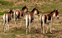 Kiang